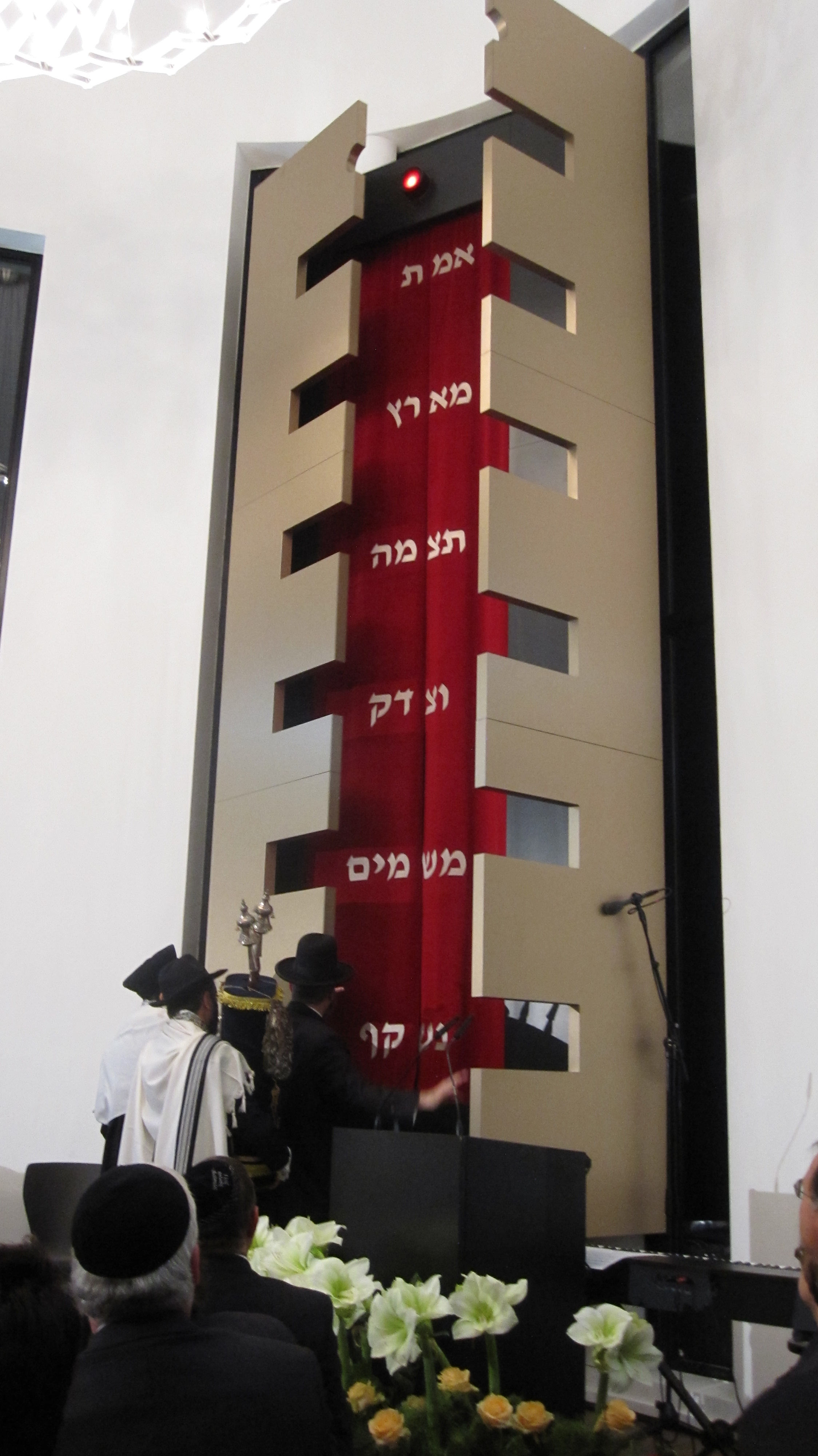 Einweihung der Beith-Schalom Synagoge Speyer - Öffnen des Toraschrankes